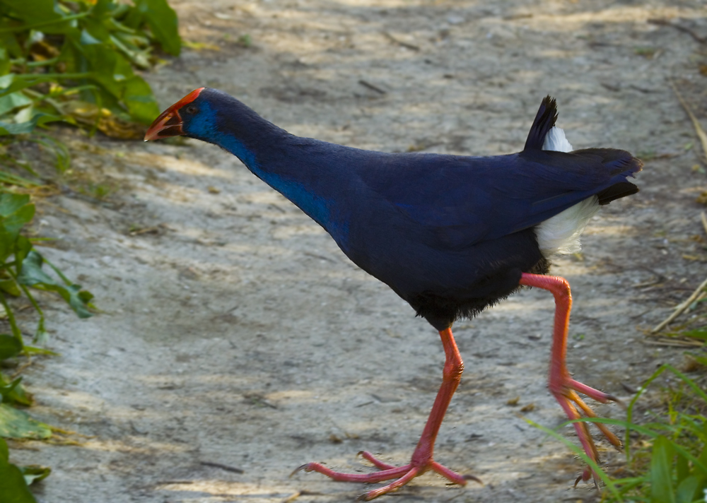 Purpurhuhn (Porphyrio porphyrio).